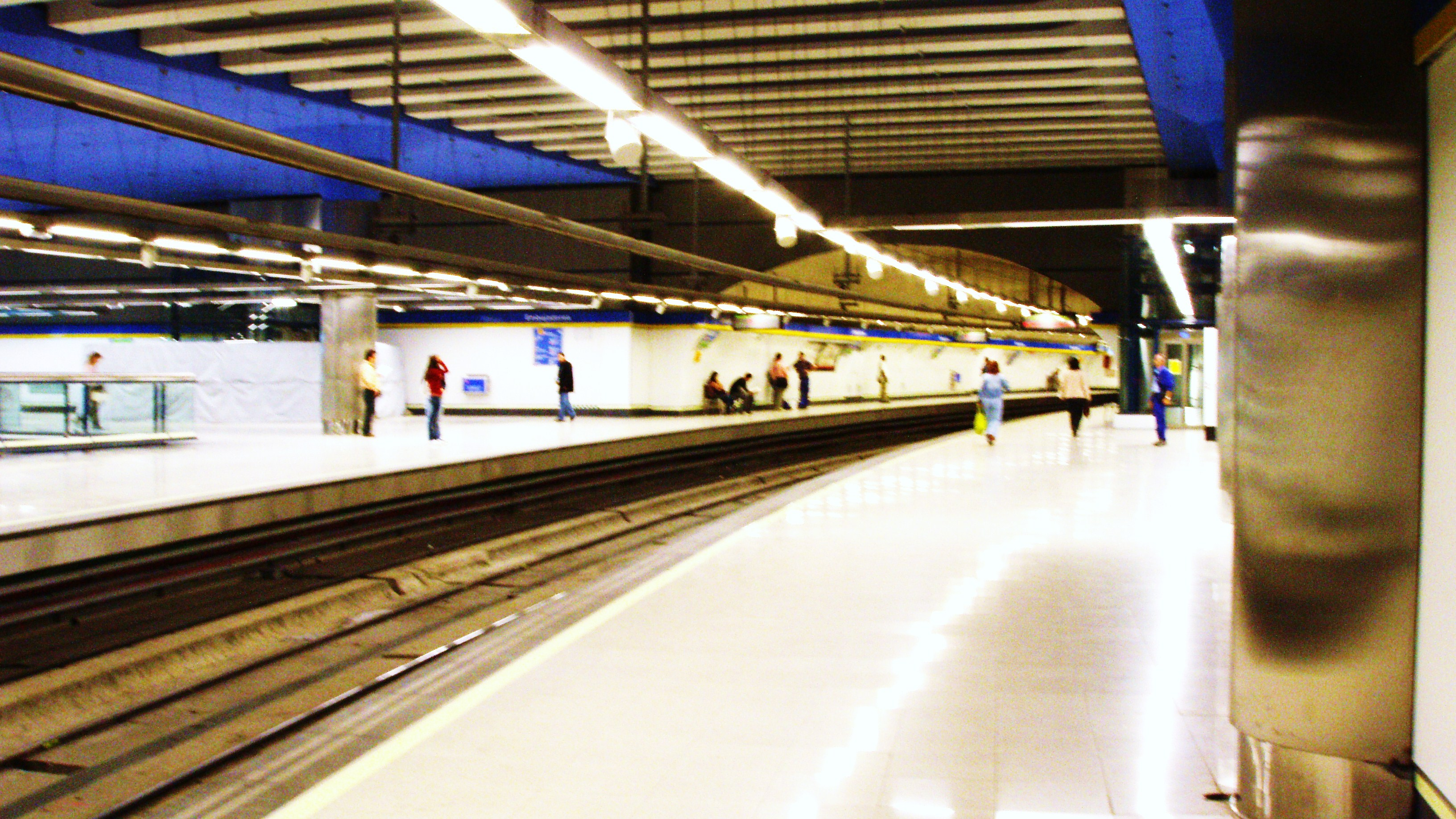 Embajadores